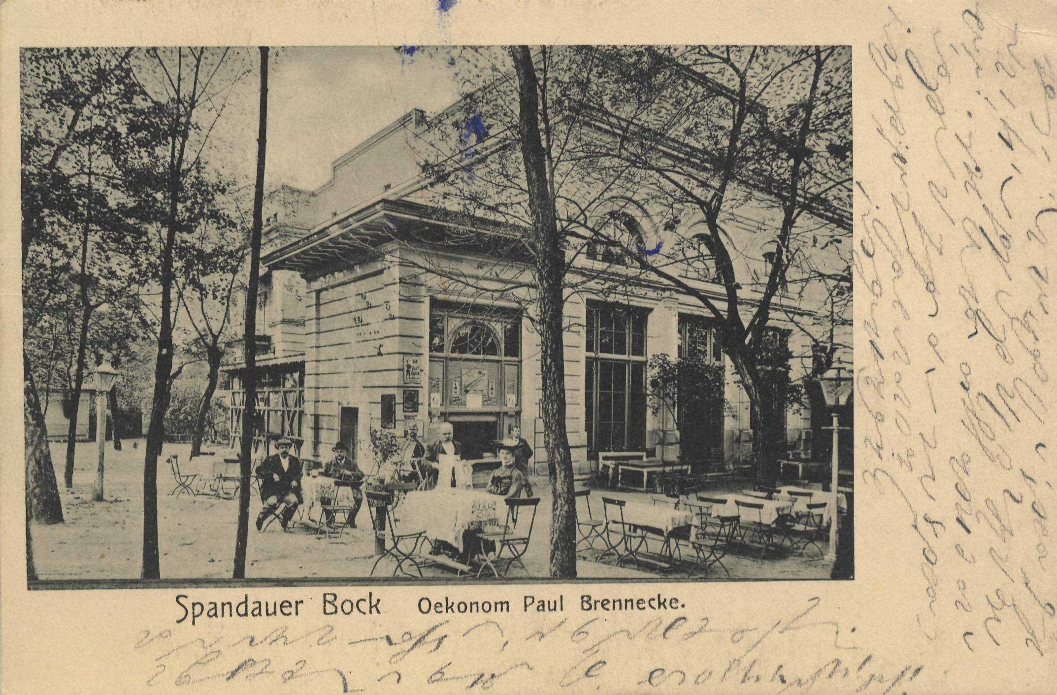 Ausflugslokal Spandauer Bock zwischen Spandauer Damm und Reichsstraße in Berlin-Westend